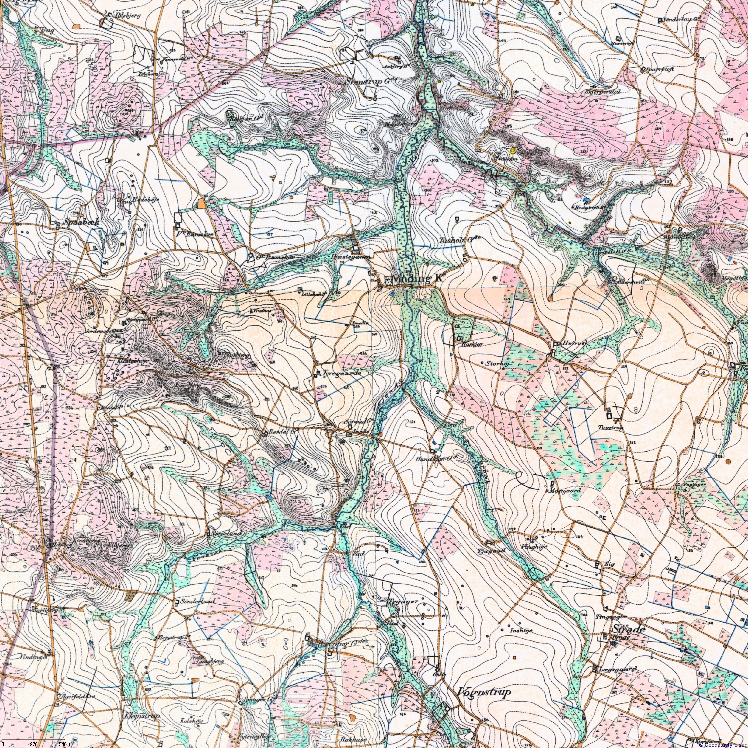 Udsnit af højt målebordsblad i 1:20.000, målt 1866-1887